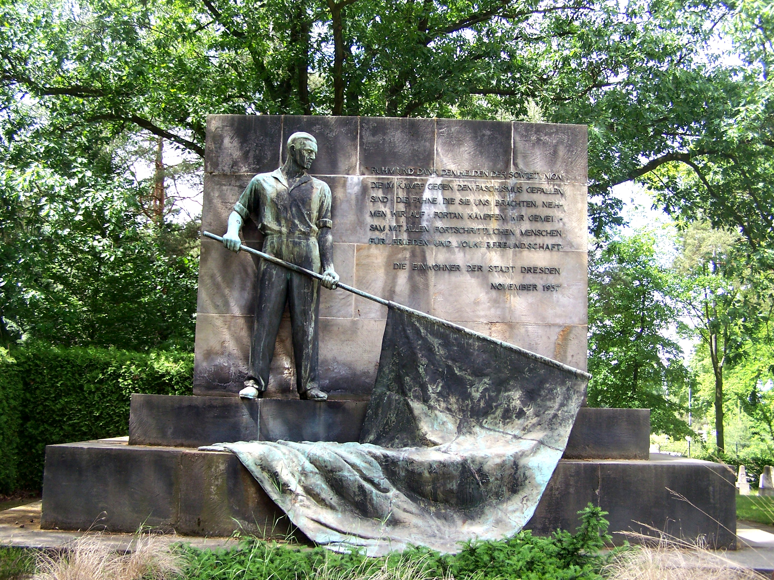 Ehrenmal auf dem Sowjetischen Garnisonfriedhof in Dresden. Bildhauer: Johannes Friedrich Rogge